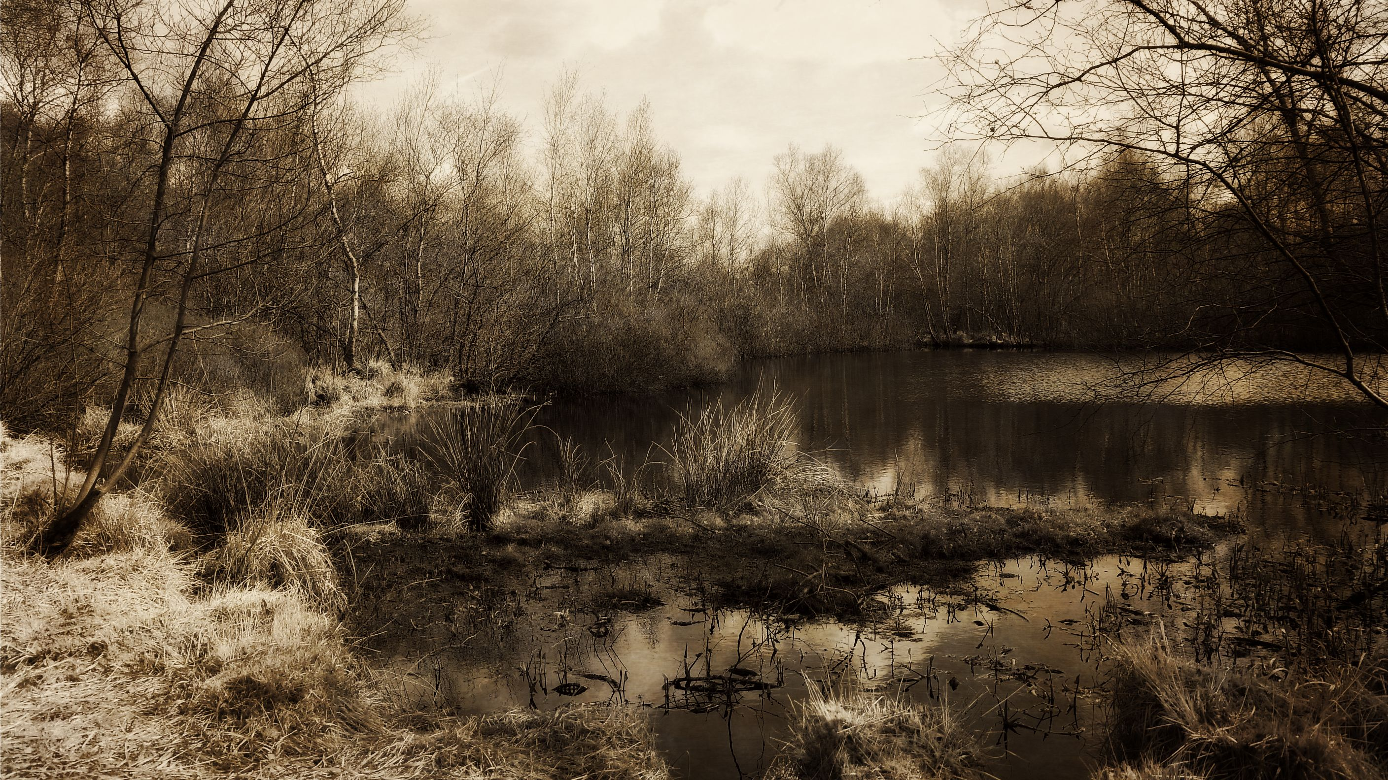 Die Gellener Torfmöörte ist ein Naturschutzgebiet in den niedersächsischen Landkreisen Wesermarsch und Ammerland und der Stadt Oldenburg, (Niedersachsen, Deutschland).